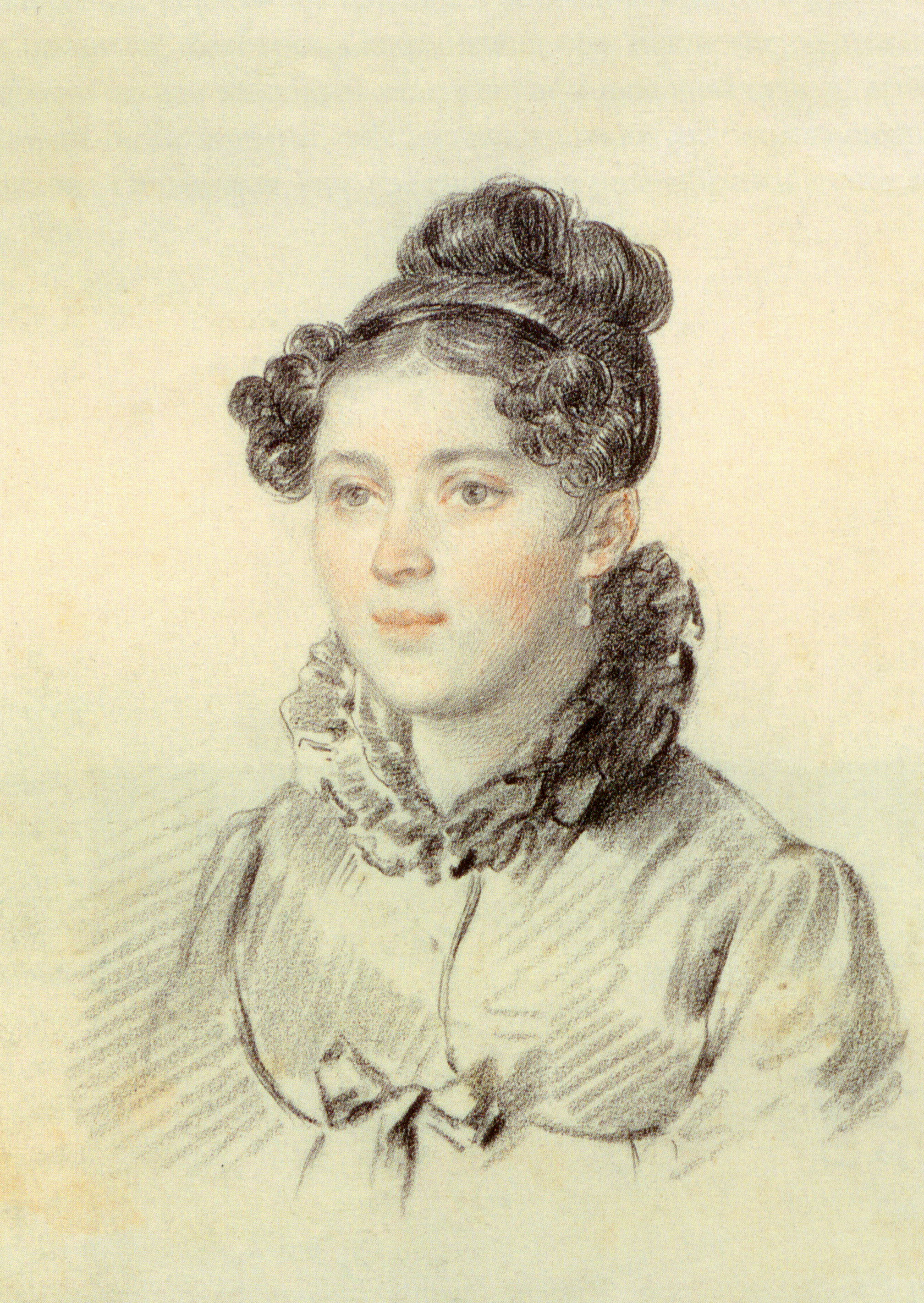 Елизавета Христофоровна Пещурова, ур. Комнено (ум. после 1863), с 1809 года жена А.Н.Пещурова. Знакомая А.С.Пушкина.